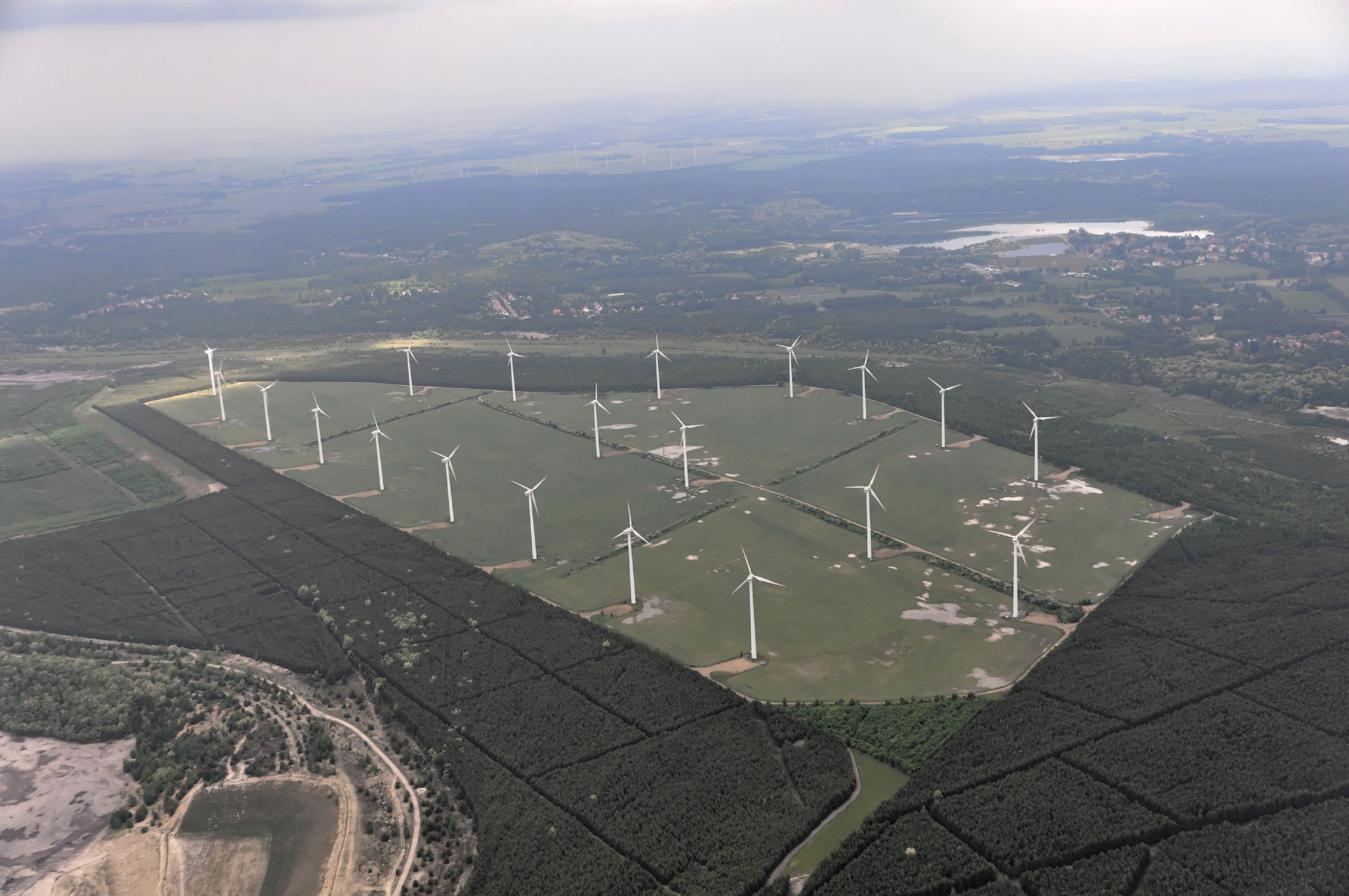 Luftaufnahme Windpark Klettwitz; Bilder von den Lausitz Luftsport- & Techniktage 2013 am Flugplatz Schwarzheide-Schipkau